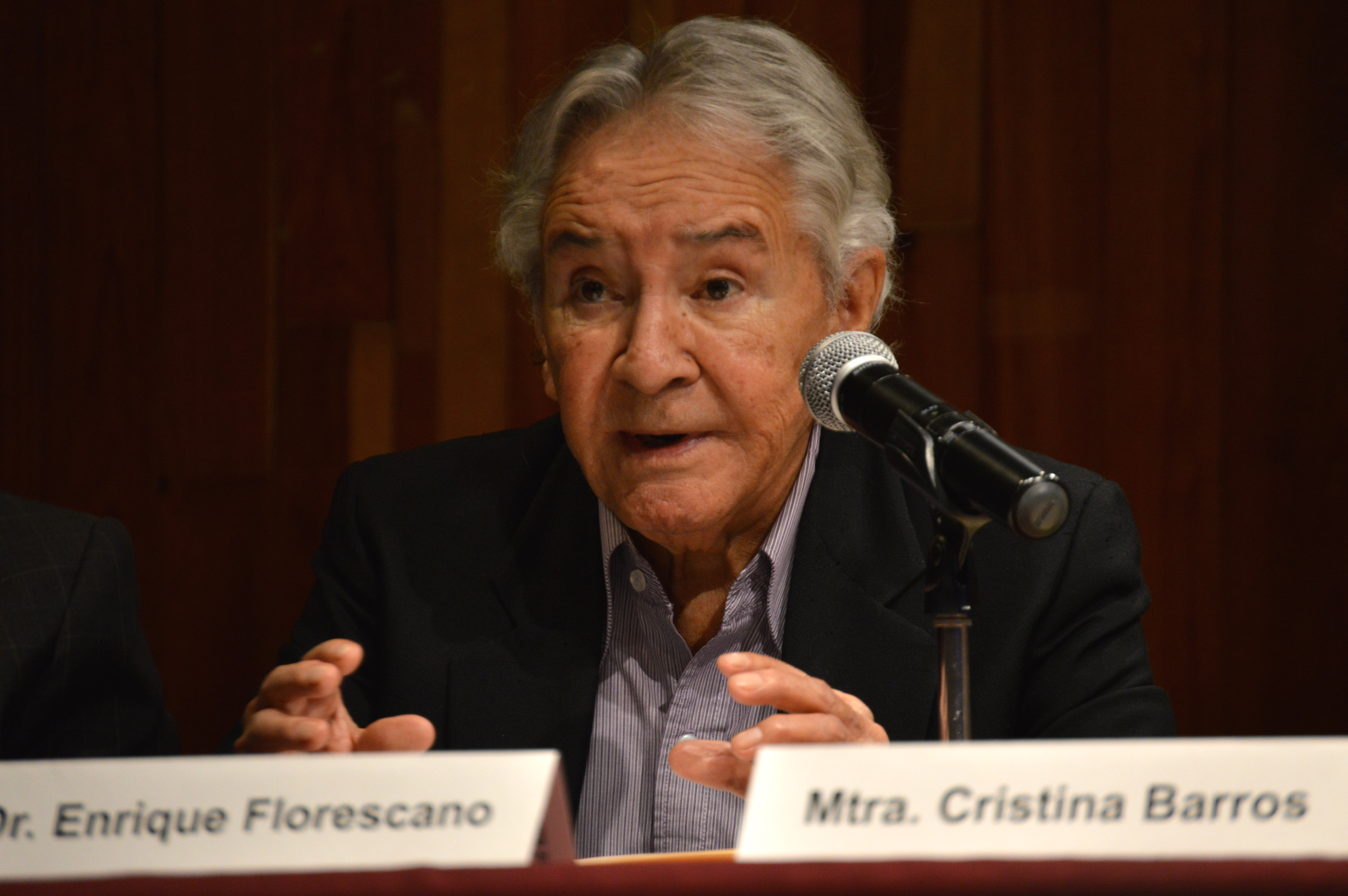 En el marco del Seminario Interdisciplinario de Alimentación del Instituto de Investigaciones Dr. José María Luis Mora (Instituto Mora), se presentó el libro El pescado blanco en la historia, la ciencia y la cultura michoacana, que aborda la importancia que ha tenido esta especie para el estado de Michoacán.